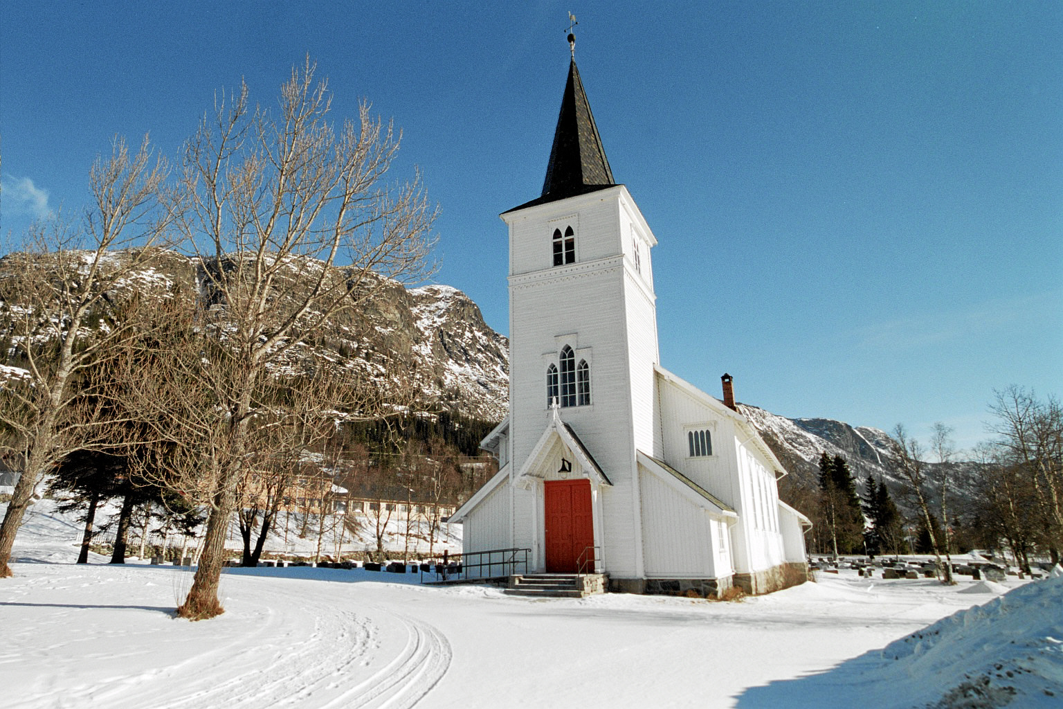 Hemsedal kirke (Hemsedal kyrkje) er en langkirke fra 1882 i Hemsedal kommune, Buskerud fylke, Norge.